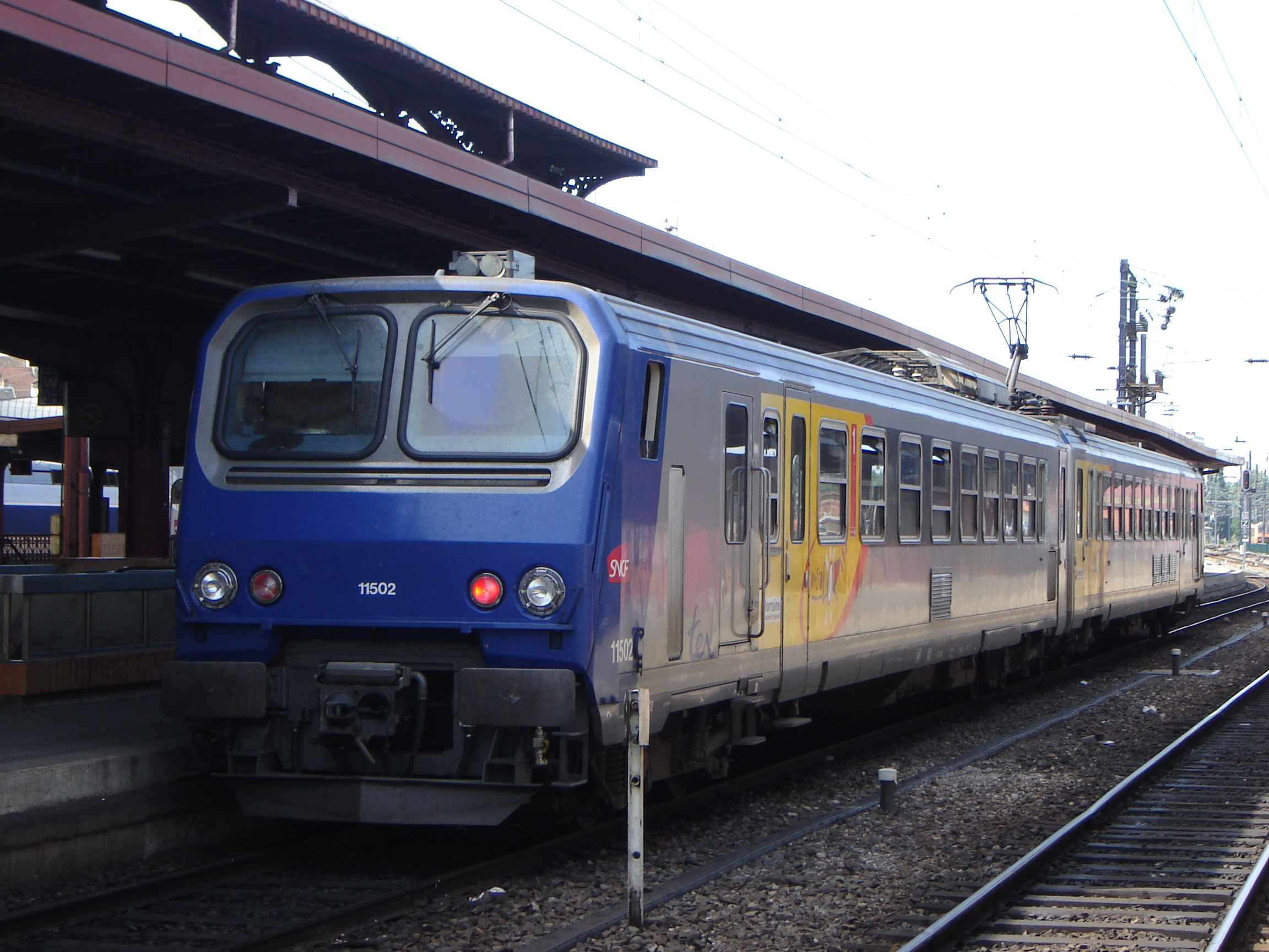 Z 11500 TER Lorraine en gare de Strasbourg